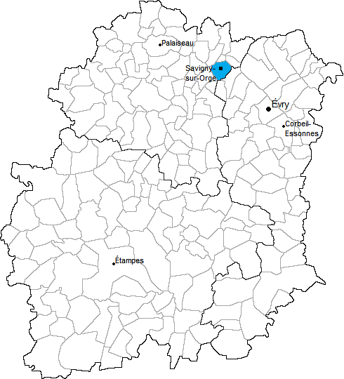 Carte du canton de Savigny-sur-Orge en Essonne (91)